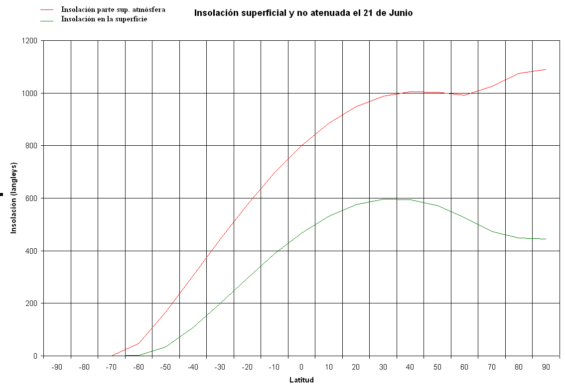 El gráfico muestra la radiación solar incidente el día del solsticio de verano en el hemisferio norte (21 de junio) en el supuesto de ausencia de atmósfera (insolación no atenuada), y en la superficie de la Tierra en función de la latitud. Al comparar ambas insolaciones se advierte que la insolación diaria superficial está notablemente disminuida. la mayor atenuación se produce a latitudes altas. La gráfica muestra que el 21 de junio hay más insolación en la parte superior de la atmósfera, en el polo norte que en el trópico. En superficie esto no es así porque los rayos muy inclinados en los polos sufren mucha absorción por la atmósfera y la nieve de las regiones polares reflejan mucha radiación hacia el espacio. Otro interesante efecto es que el máximo de la insolación superficial y por tanto de la temperaturas máximas superficiales, no se produce en el ecuador sino cerca del trópico. Una de las razones es que el día dura más en los trópicos que en el ecuador. El gráfico es el resultado de un programa realizado por el autor en 1995 para intentar reproducir un gráfico similar visto en el libro Meteorología de R.G. Barry y R. J. Chorley titulado Atmósfera, tiempo y clima. A partir de los datos, se ha hecho el gráfico utilizando la hoja de cálculo Excel.